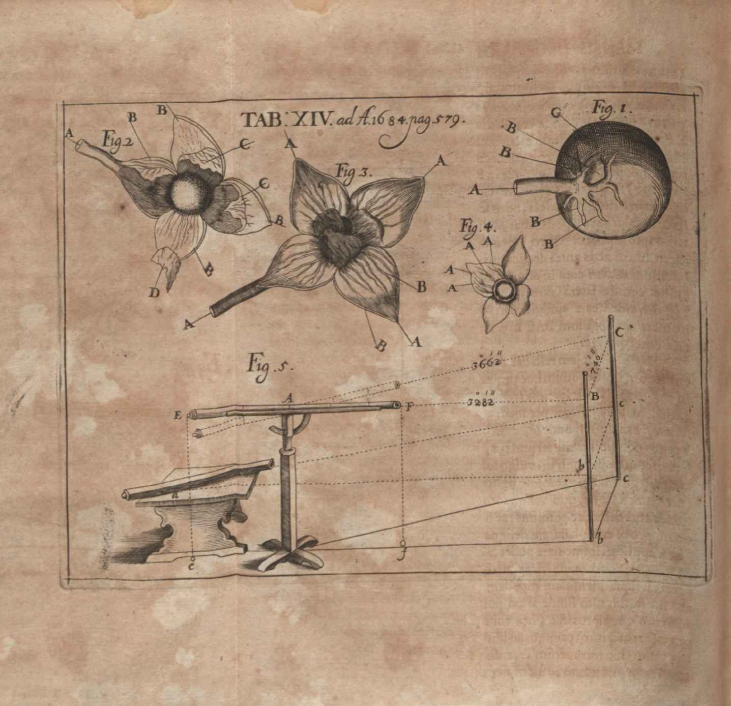 Illustration